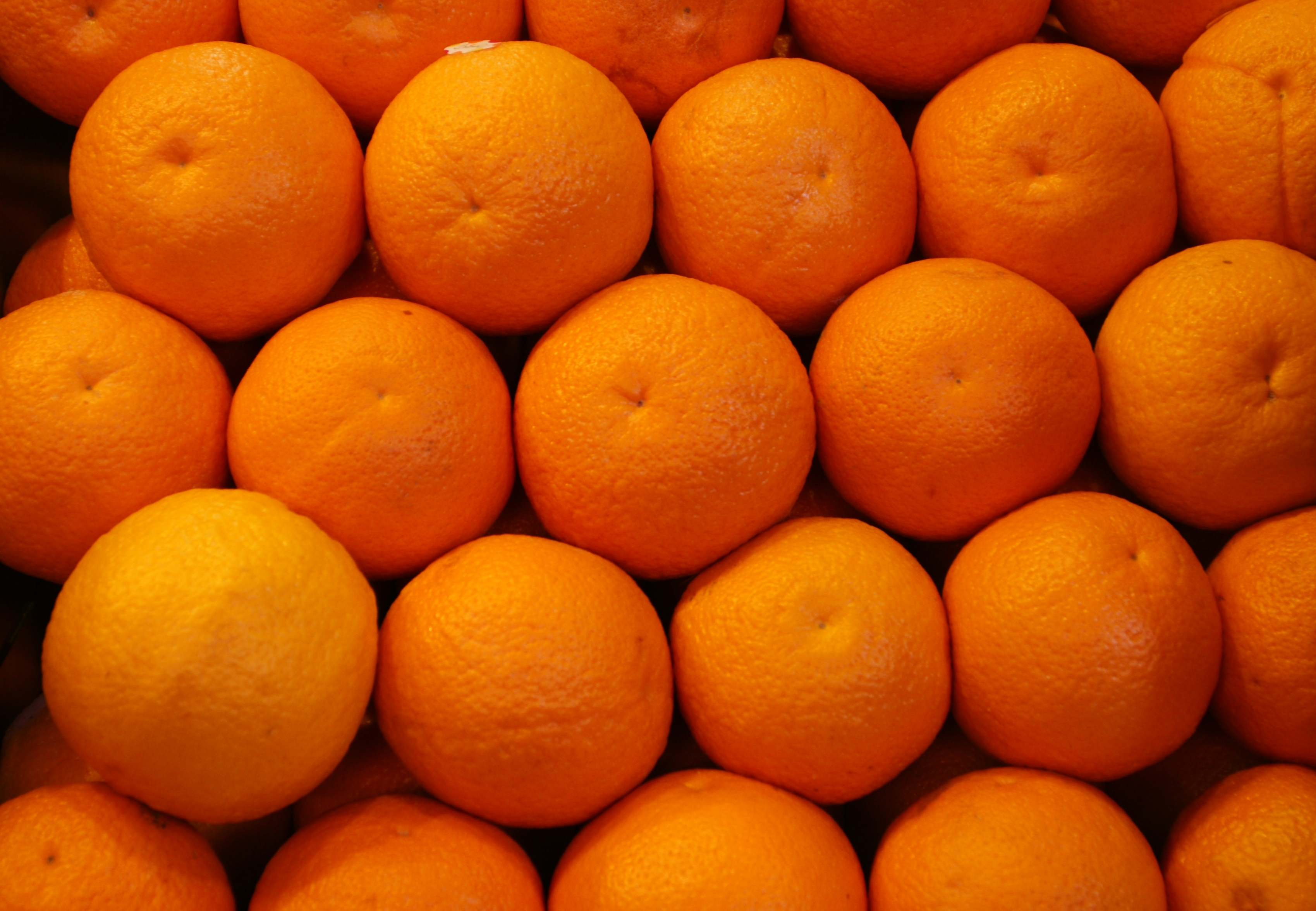 Die Markthallen des Mercat de la Boqueria liegen an der Straße La Rambla in Barcelona, Spanien und haben eine Fläche von 2.583 m². *** Die Orange nördlich der Mainlinie auch Apfelsine genannt, ist ein immergrüner Baum, im speziellen wird auch dessen Frucht so genannt. Die wissenschaftliche Bezeichnung ist Citrus × aurantium (Syn. Citrus aurantium L. var. sinensis L. oder Citrus sinensis (L.) Osbeck).